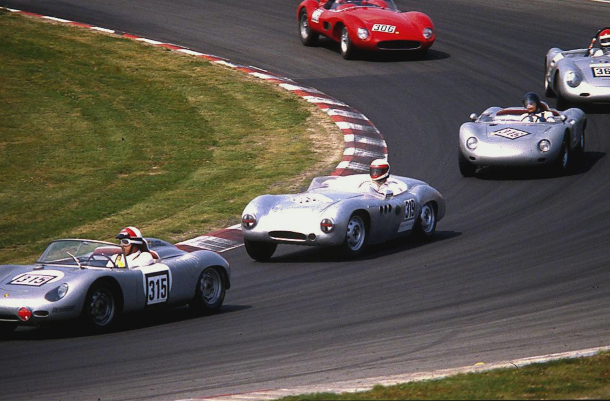 Porsche RS 60, Baujahr 1959, Borgward RS, Baujahr 1958, und Porsche RSK, Baujahr 1958, beim Oldtimer-Grand-Prix des AvD 1989 in der Fordkurve des Nürburgrings, Geschwindigkeit an dieser Stelle ca. 75 km/h)